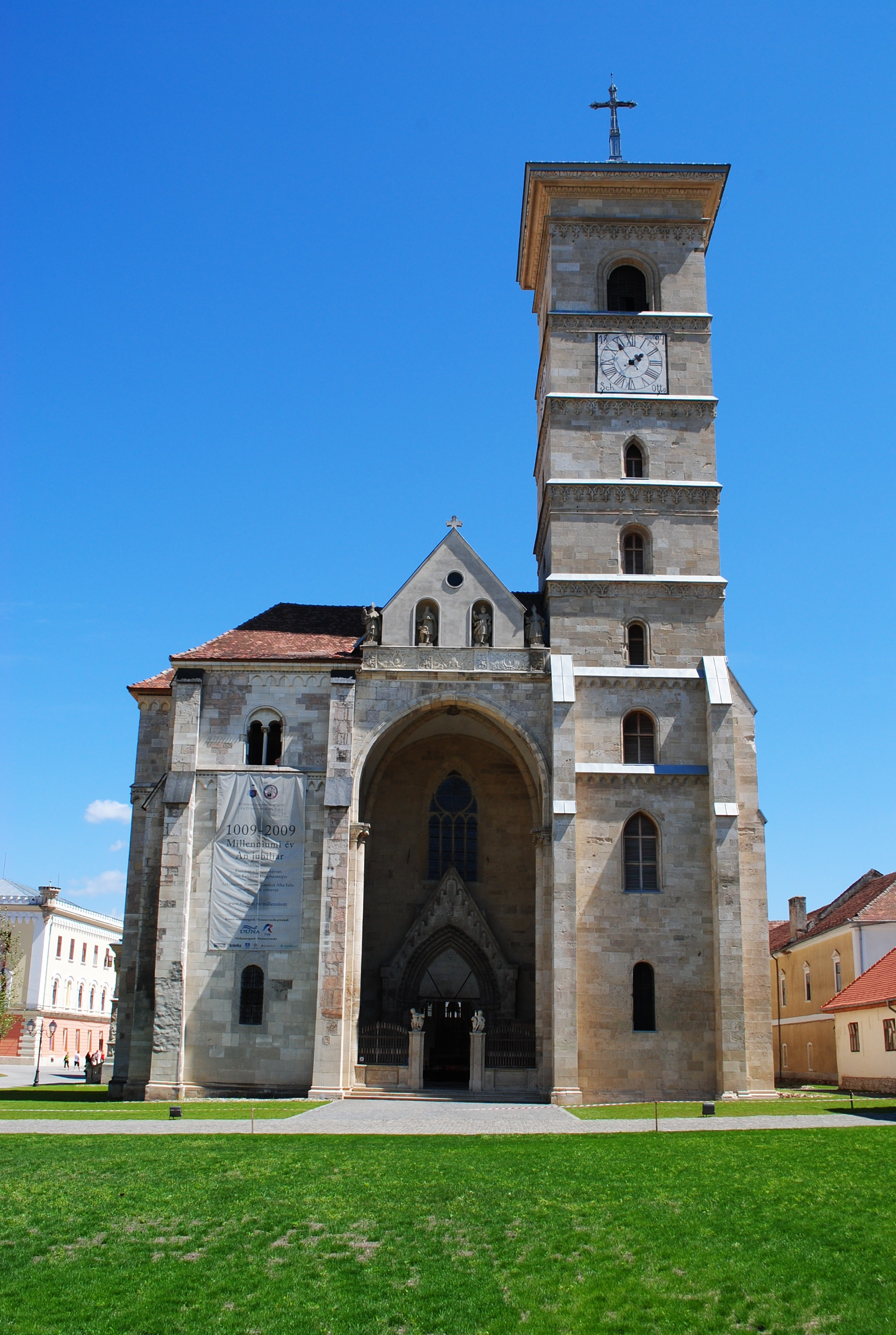 Catedrala romano-catolică "Sf. Mihail" sec. XIII-XVI